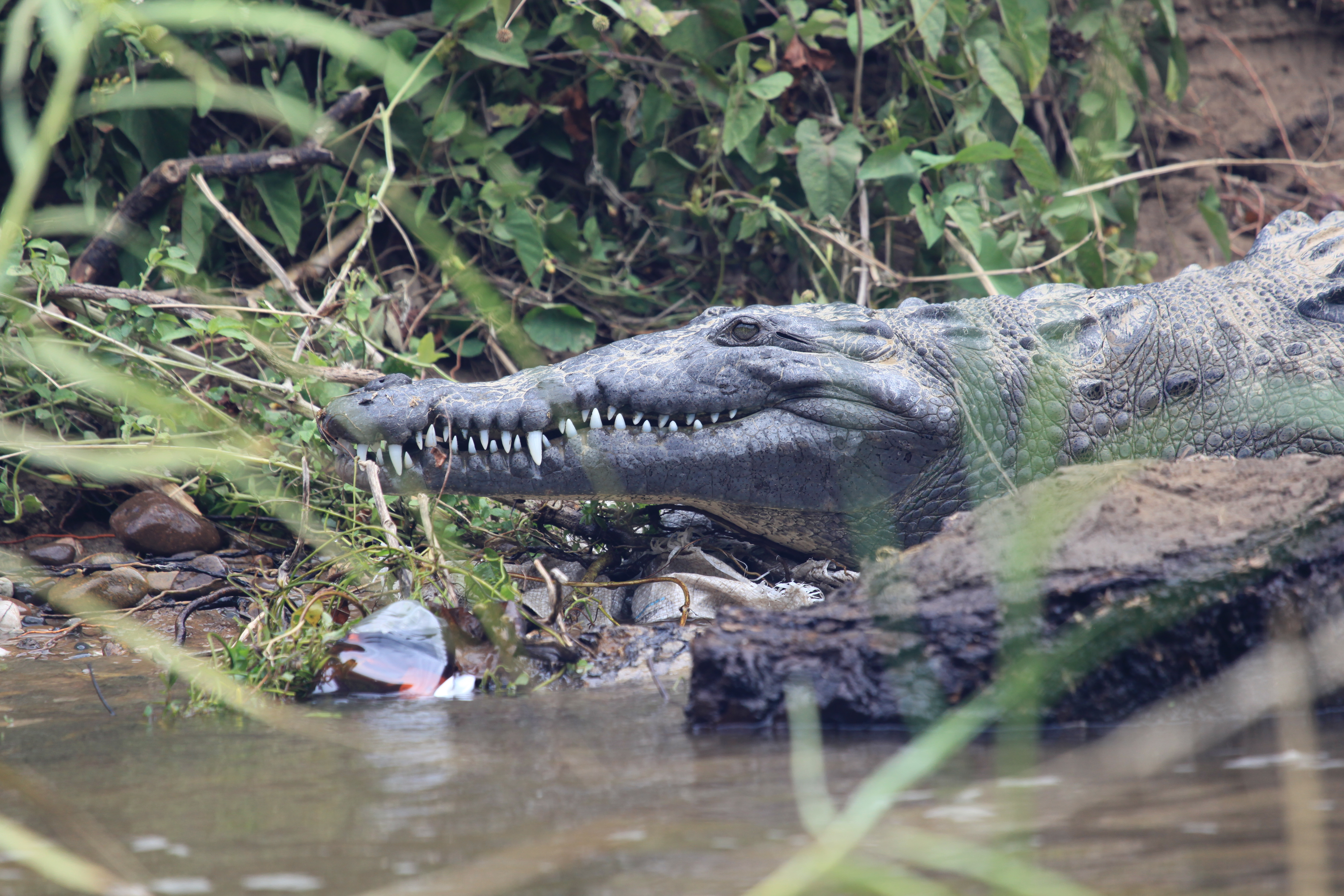 Cocodrilo de Río -Crocodylus acutus- American crocodile en el Cañón del Sumidero en Chiapas México